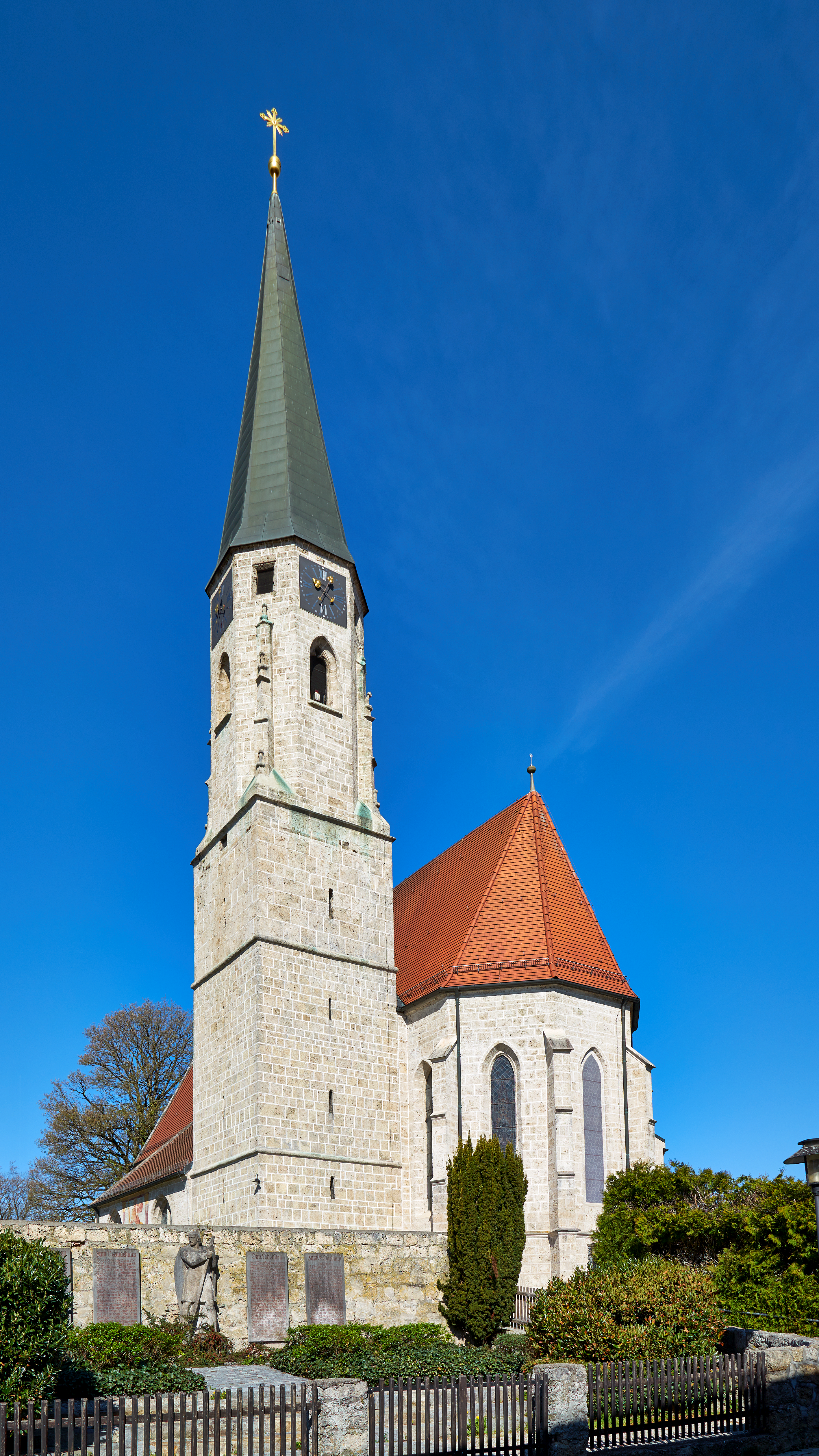 Katholische Pfarrkirche Mariä Himmelfahrt, stattlicher einschiffiger spätgotischer Tuffsteinquaderbau mit Südturm, Mitte 15. Jahrhundert, Anbau St. Annakapelle südlich am Langhaus, um 1525; mit Ausstattung; Kirchhofummauerung, Tuffquader, 15./16. Jahrhundert, in Resten erhalten; Priestergrabanlage, neugotisch, 1915; Kruzifix, 19. Jahrhundert, im südlichen Kirchhofteil.